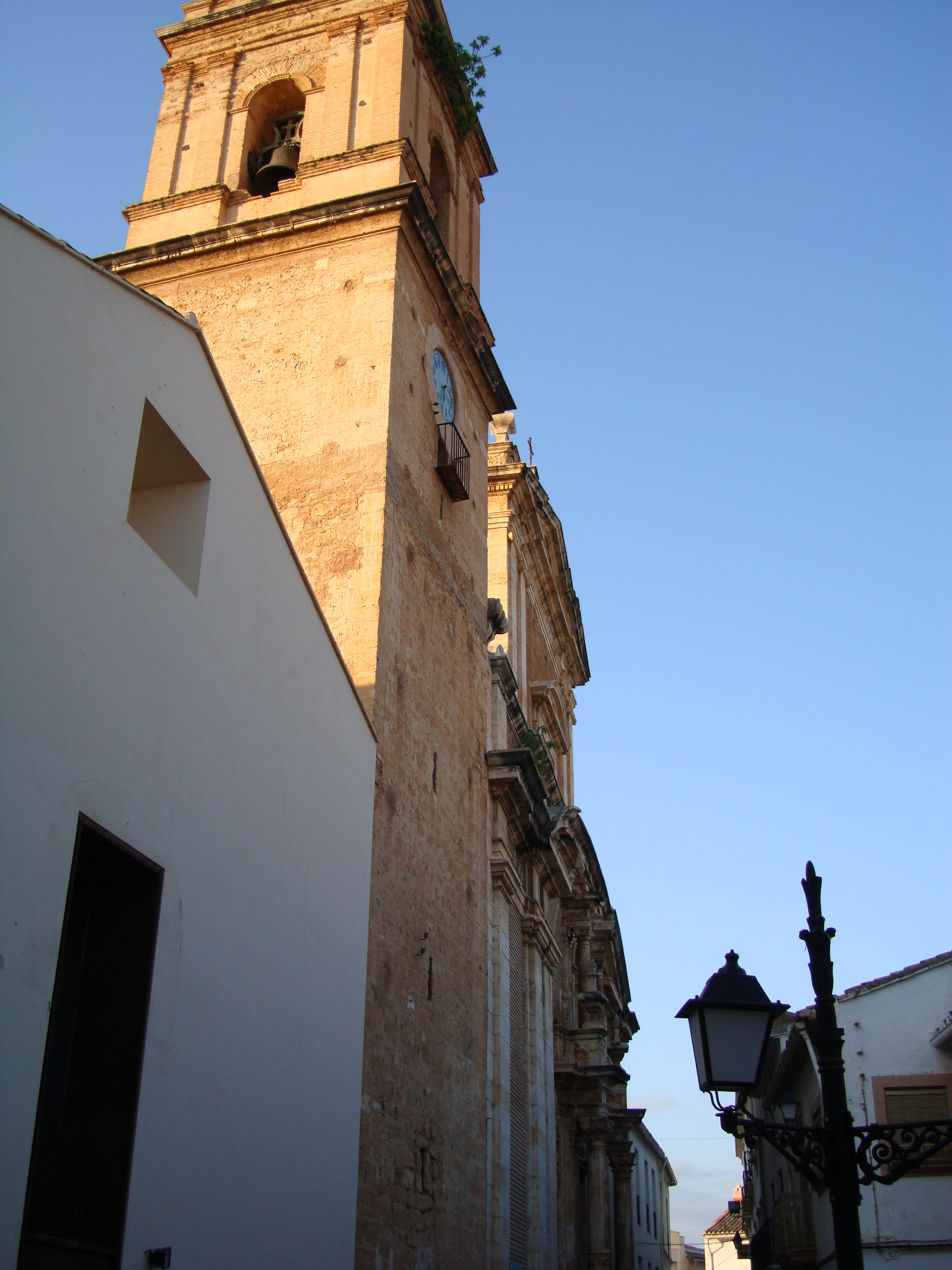 Església parroquial de la Puríssima Concepció de Pedralba (els Serrans, País Valencià).